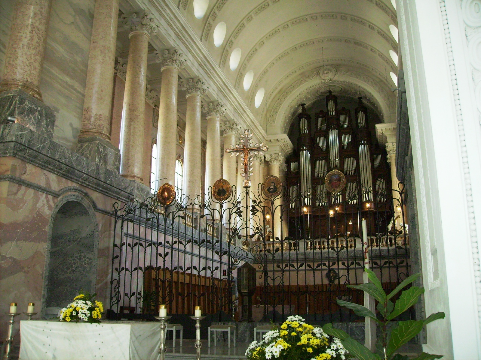 Sankt Blasien Schwarzwald